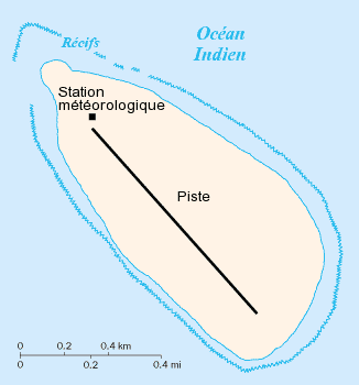 Carte de l'île Tromelin Fond de carte de la CIA francisé, Données de août 2005.